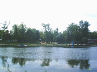 Городской сал им. Кельдюшева, г. Шадринск, Курганская обл., Россия (City garden of name Keldyushev, Shadrinsk, Kurgan region, Russia) Автор/Autor - Сычугов М.В./ Sychugov M.V. Время создания/Data-Time - 21 июня/june, 2004, 14:50 Фотоаппарат/Camera - Mustek DC 4000